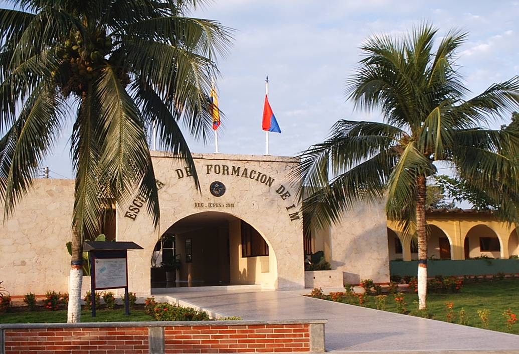 Alma Máter de los Suboficiales de Infantería de Marina en Colombia